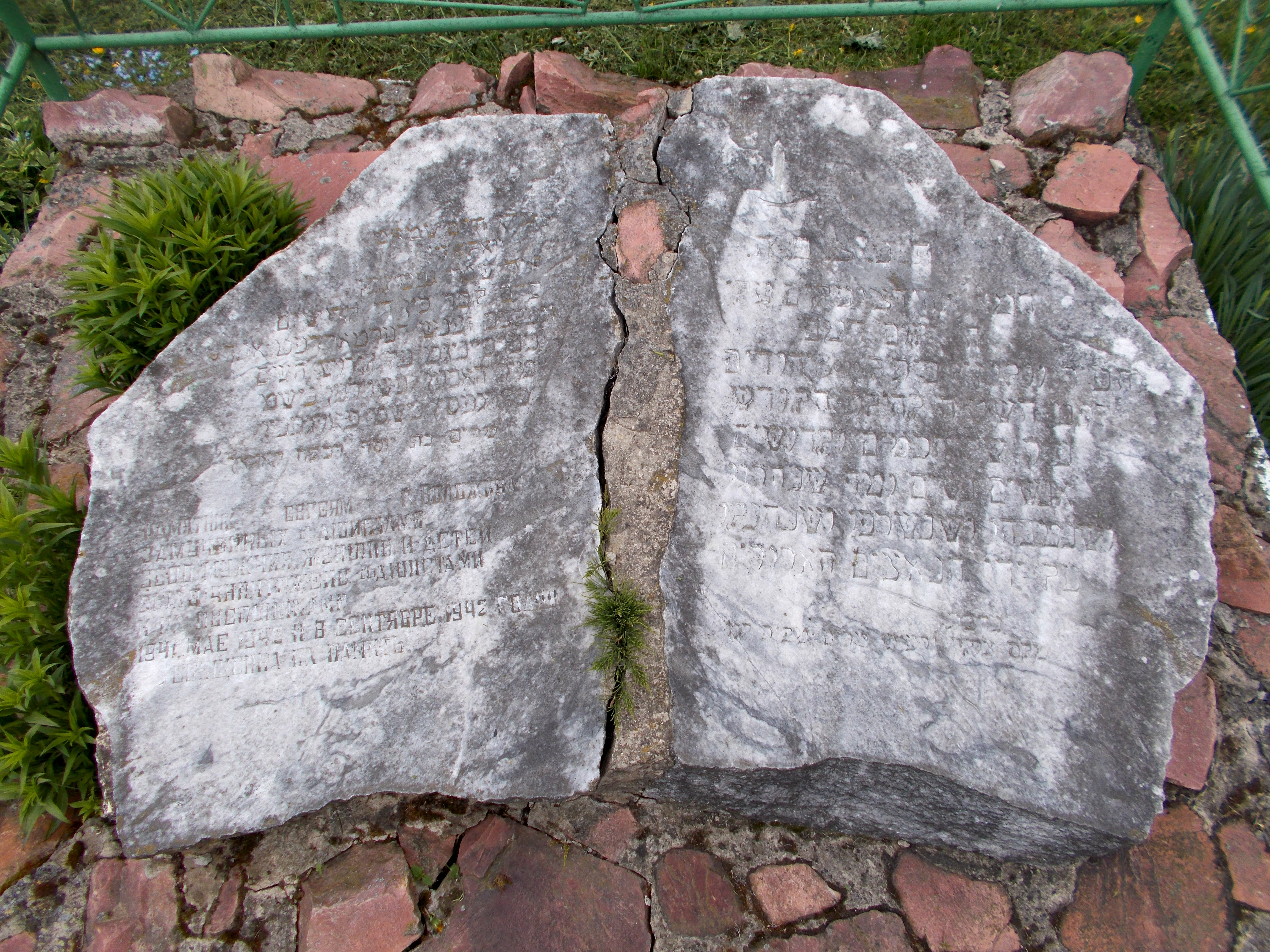 Памятник в Воложине на месте массовых убийств местных евреев во время Холокоста с надписью на русском языке и на иврите: "Памятник евреям г. Воложина, замученных фашистами. 3600 мужчин, женщин и детей было уничтожены фашистами и их пособниками в 1941, мае 1942 и сентябре 1942 годов. Священна их память." Памятник находится на территории ОАО "Воложинское агропромэнерго" на улице Пушкина, 53а.